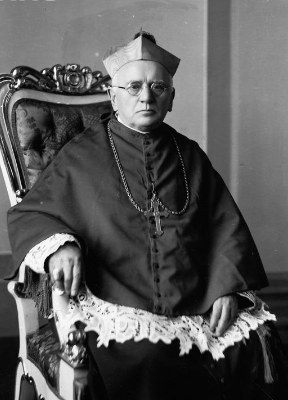 Biskup Bolesław Twardowski